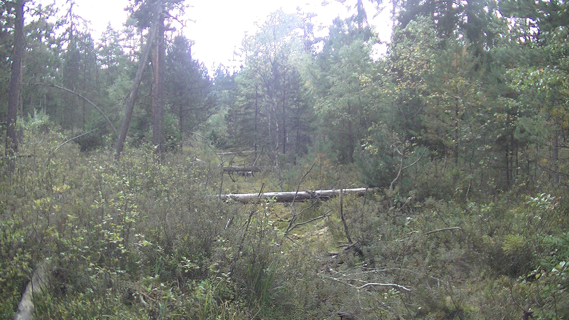 PR Losí blato u Mirochova